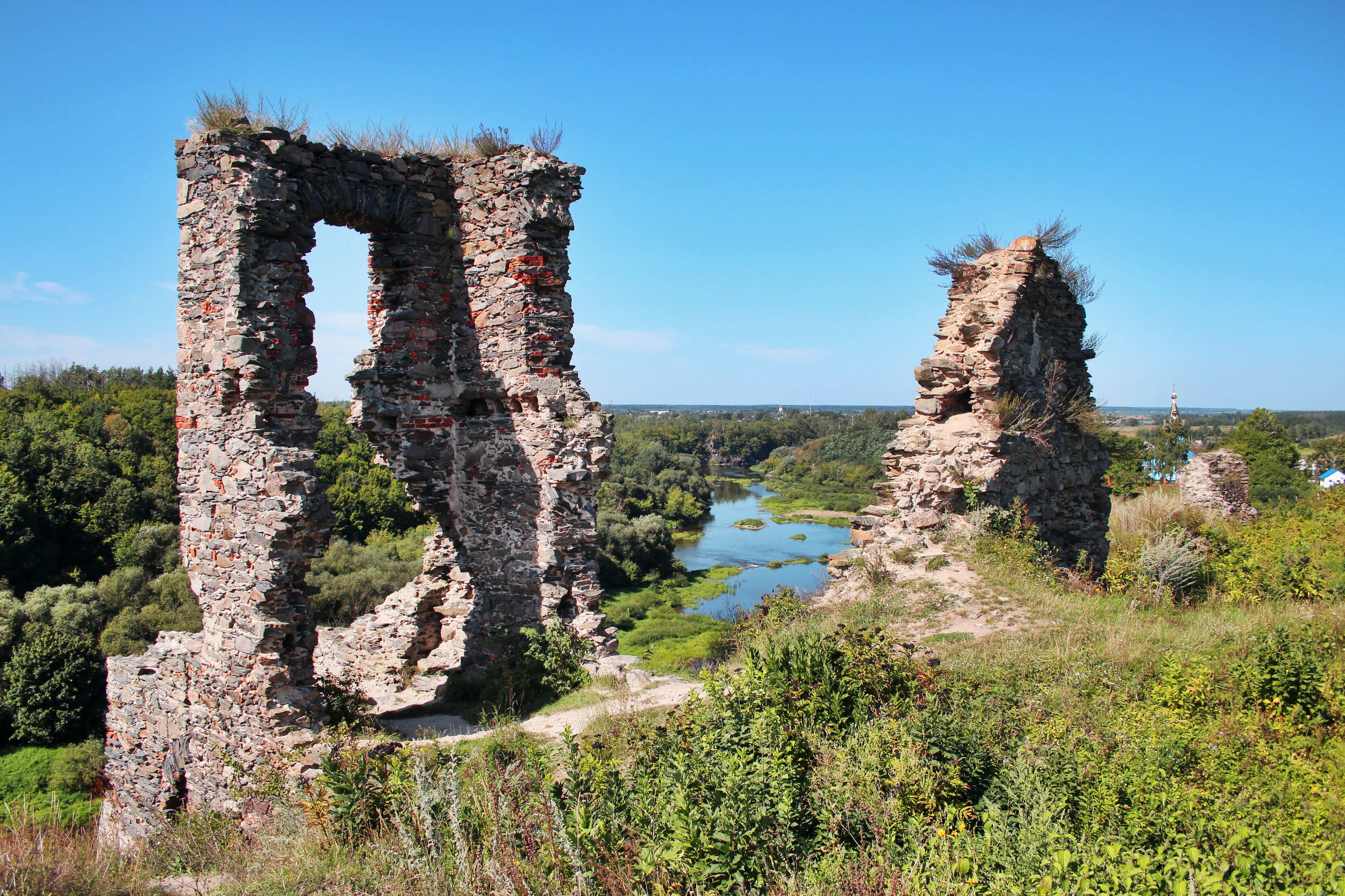 Руїни замку (мур.), с.Губків